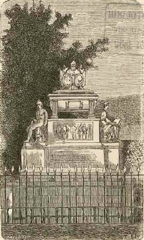 Santiago - Mausoleo de O'Higgins (1872).